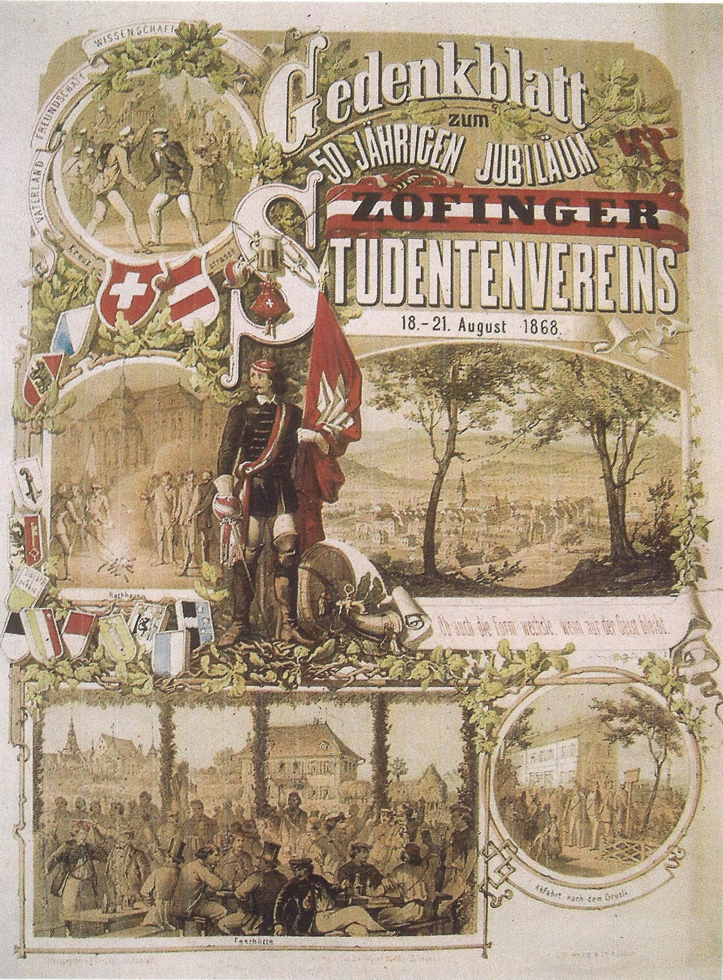 50 Jahre Zofingia, Gedenkblatt 1868